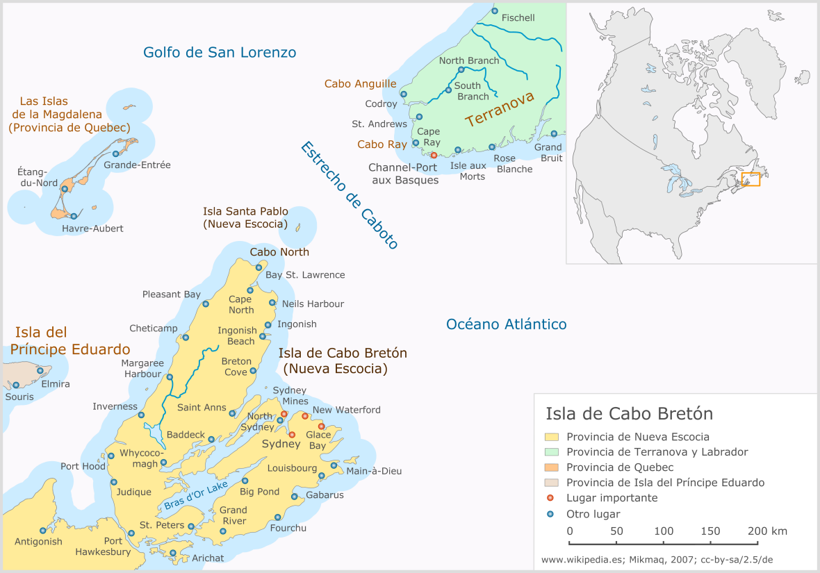 Isla de Cabo Bretón